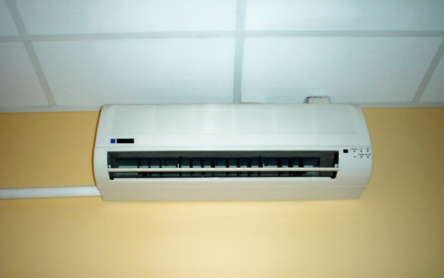 Klimatyzator, jednostka wewnętrzna naścienna. Od czoła widać uchyloną listwę nawiewną, a z boku - rurę skroplinową.